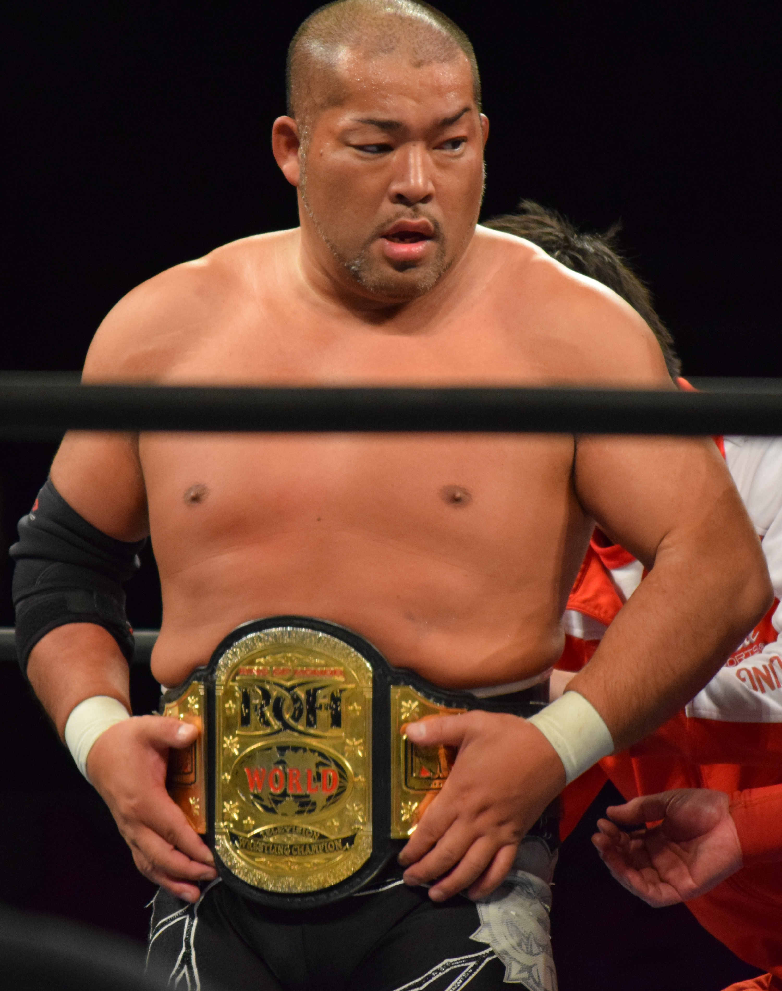 2016年3月20日 ベイコム総合体育館「Road to INVASION ATTACK 2016」 ROH世界TV王座を腰に巻く石井智宏